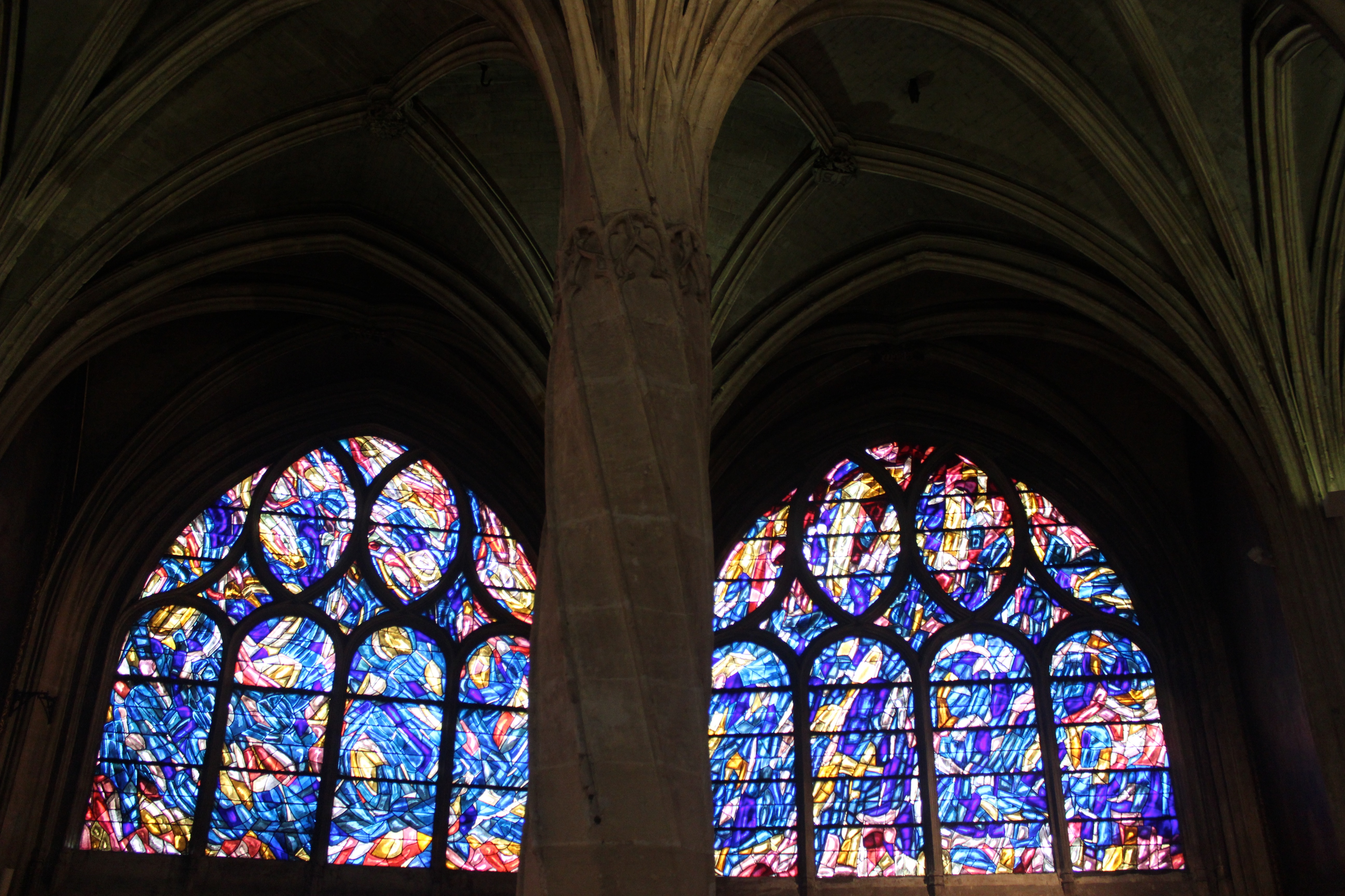 París. Saint Séverin. Vidrieras de la girola.